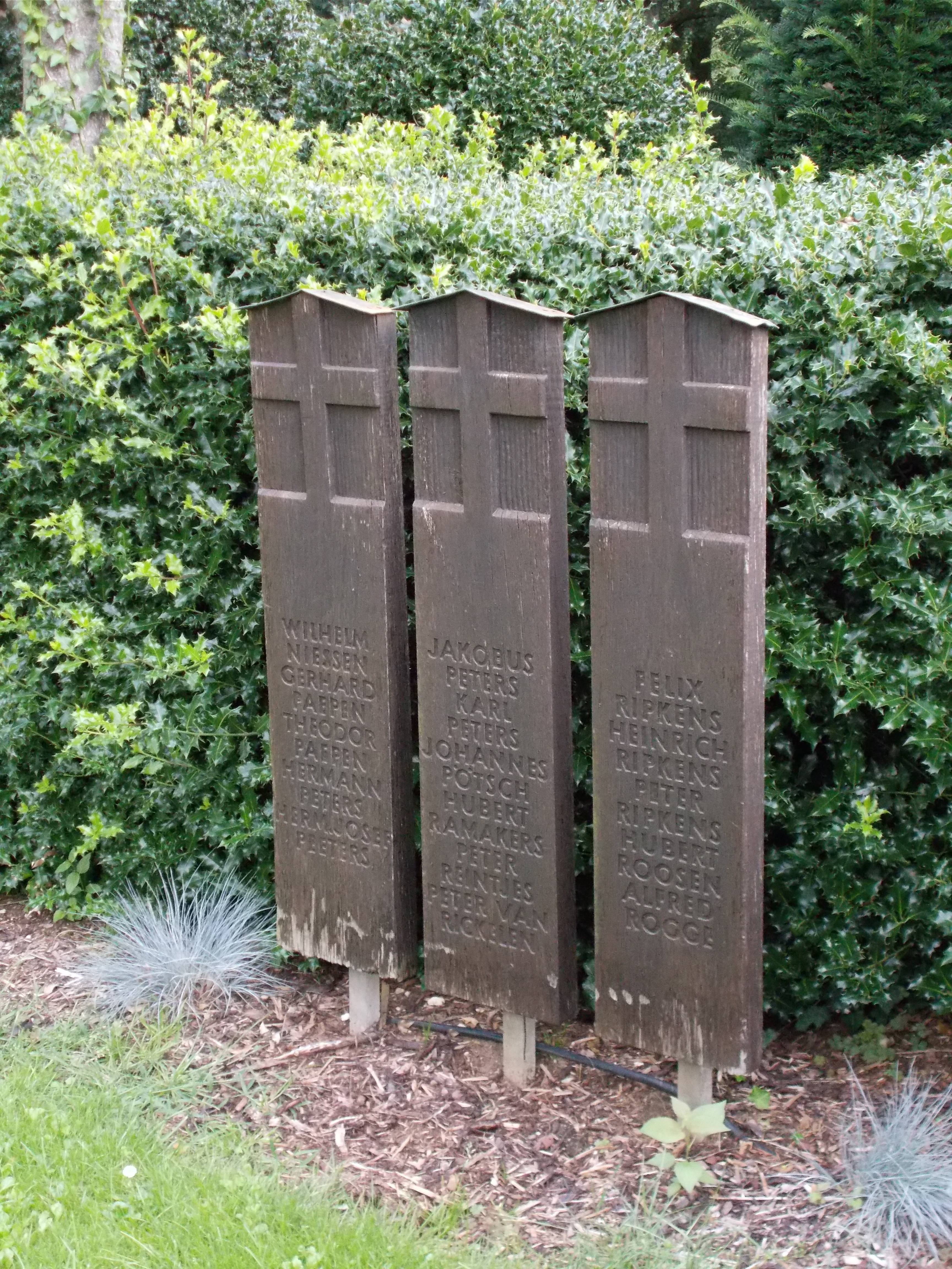 Dreiergruppe Eichensteelen mit Namen von Kriegstoten aus Weeze.